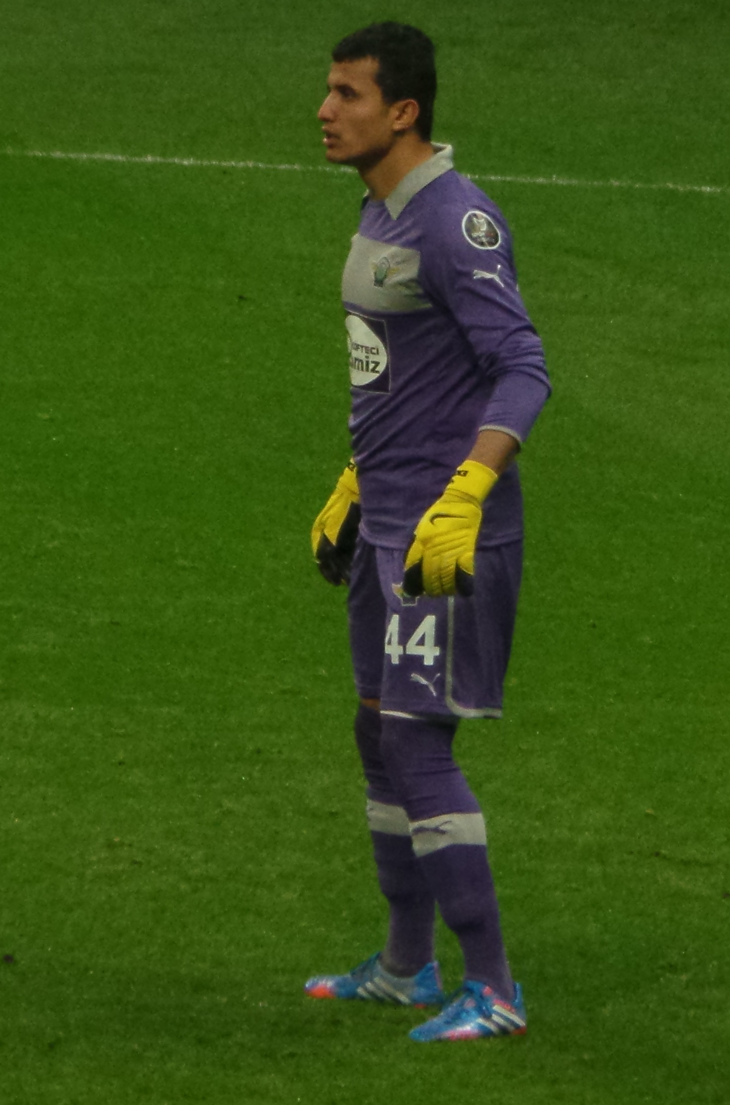 Emrah Tuncel